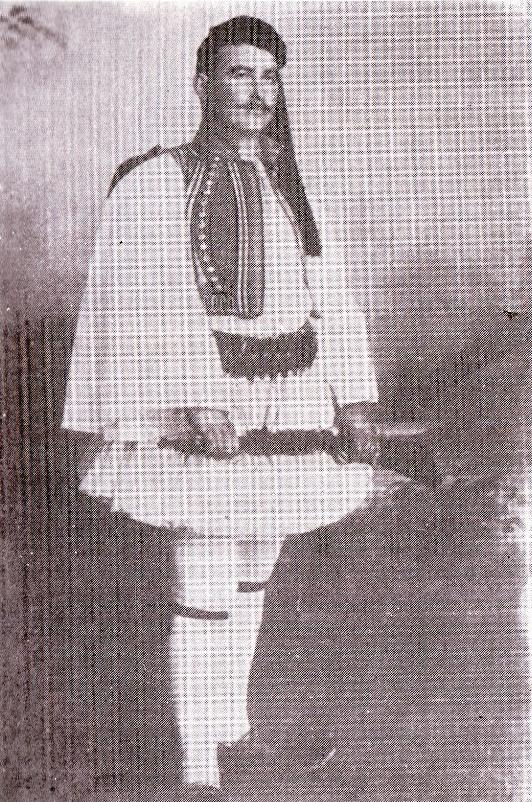 Гръцкият андартски капитан Николаос Дубиотис.